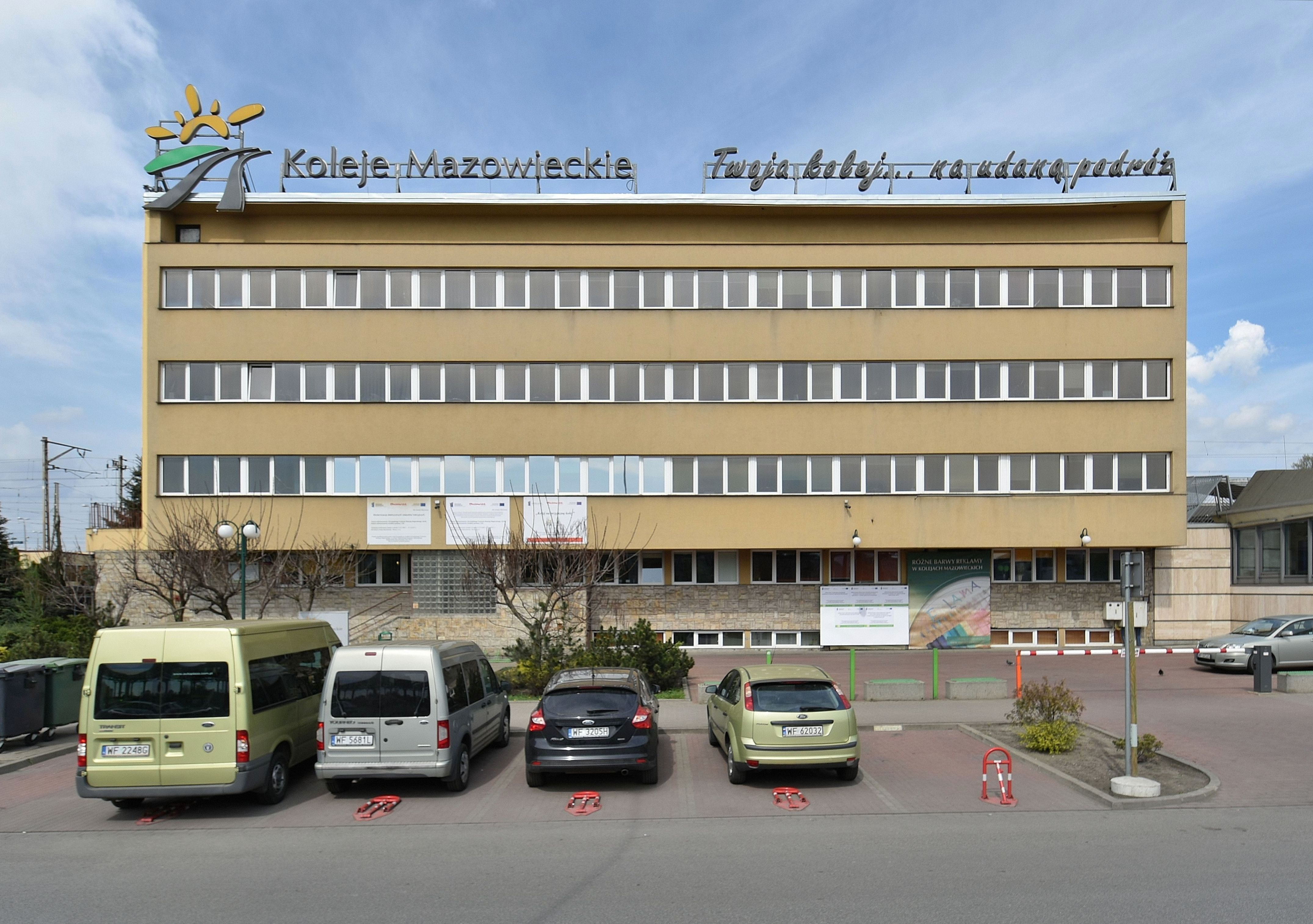 Siedziba spółki Koleje Mazowieckie przy ul. Lubelskiej w Warszawwie